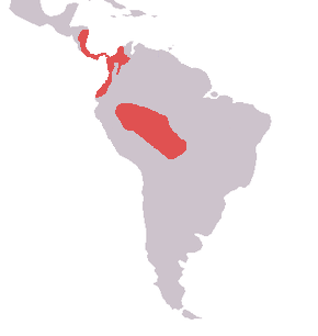 Repartition de l'Unau d'Hoffmann